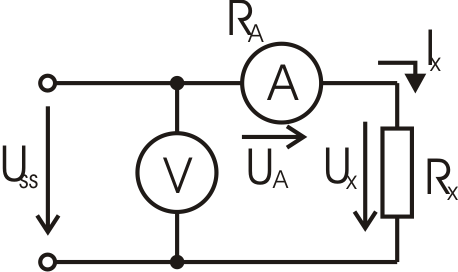 Schéma zapojení pro měření velkých odporů